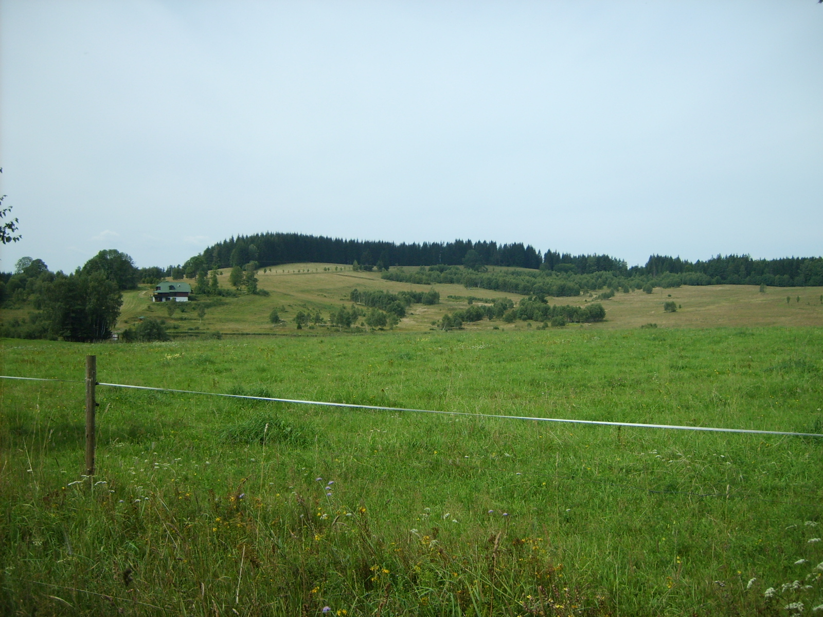 Former village Dolní Přibrání in Novohradské hory.